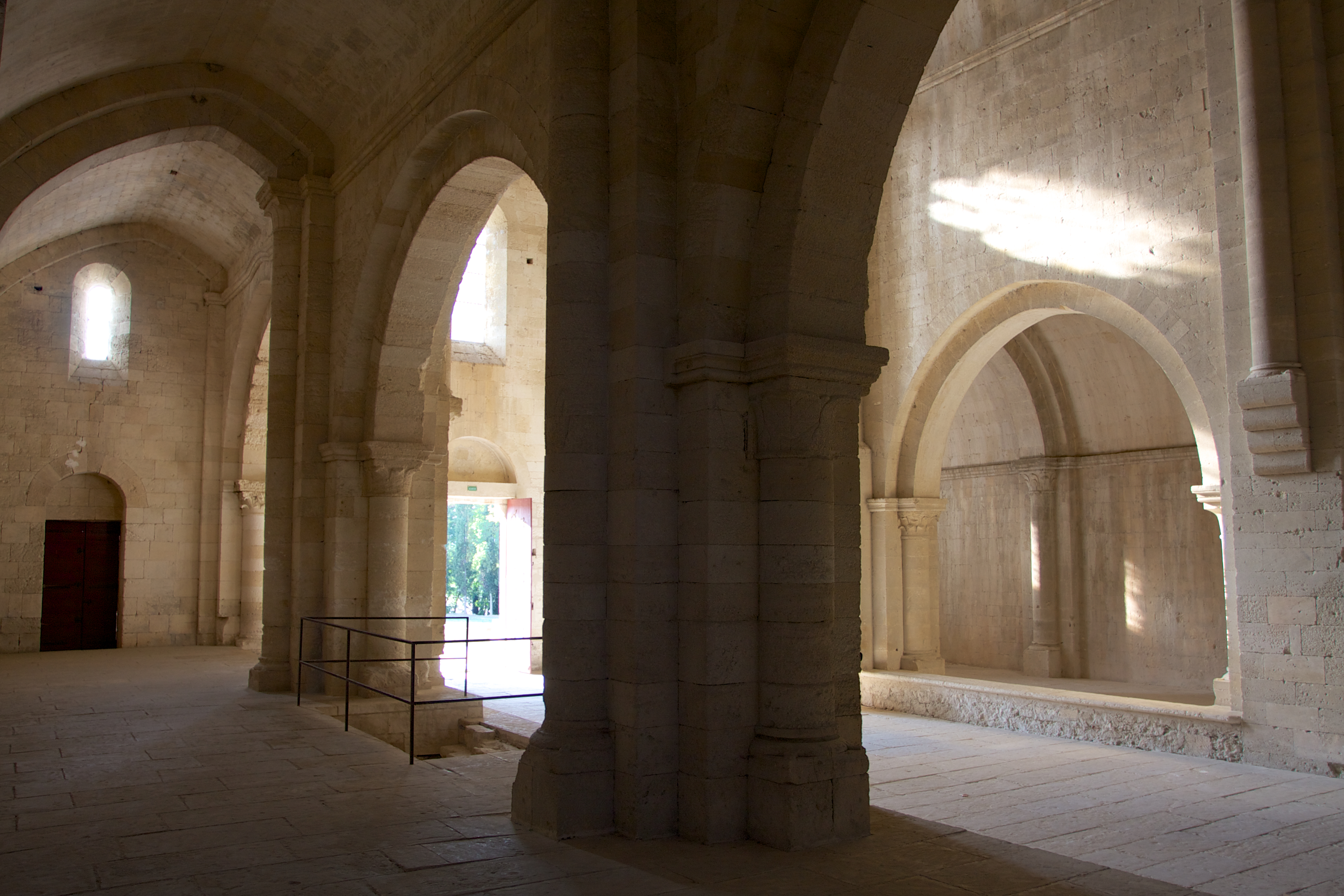 Détail l'abbaye de Sylvacane, commune de La Roque-d'Anthéron